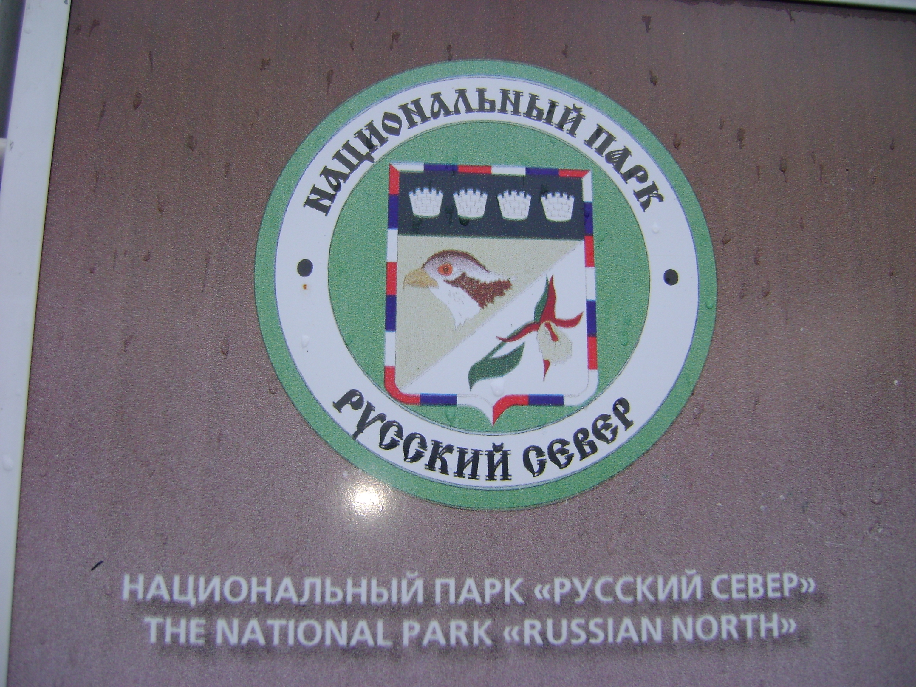 Эмблема национального парка "Русский Север"